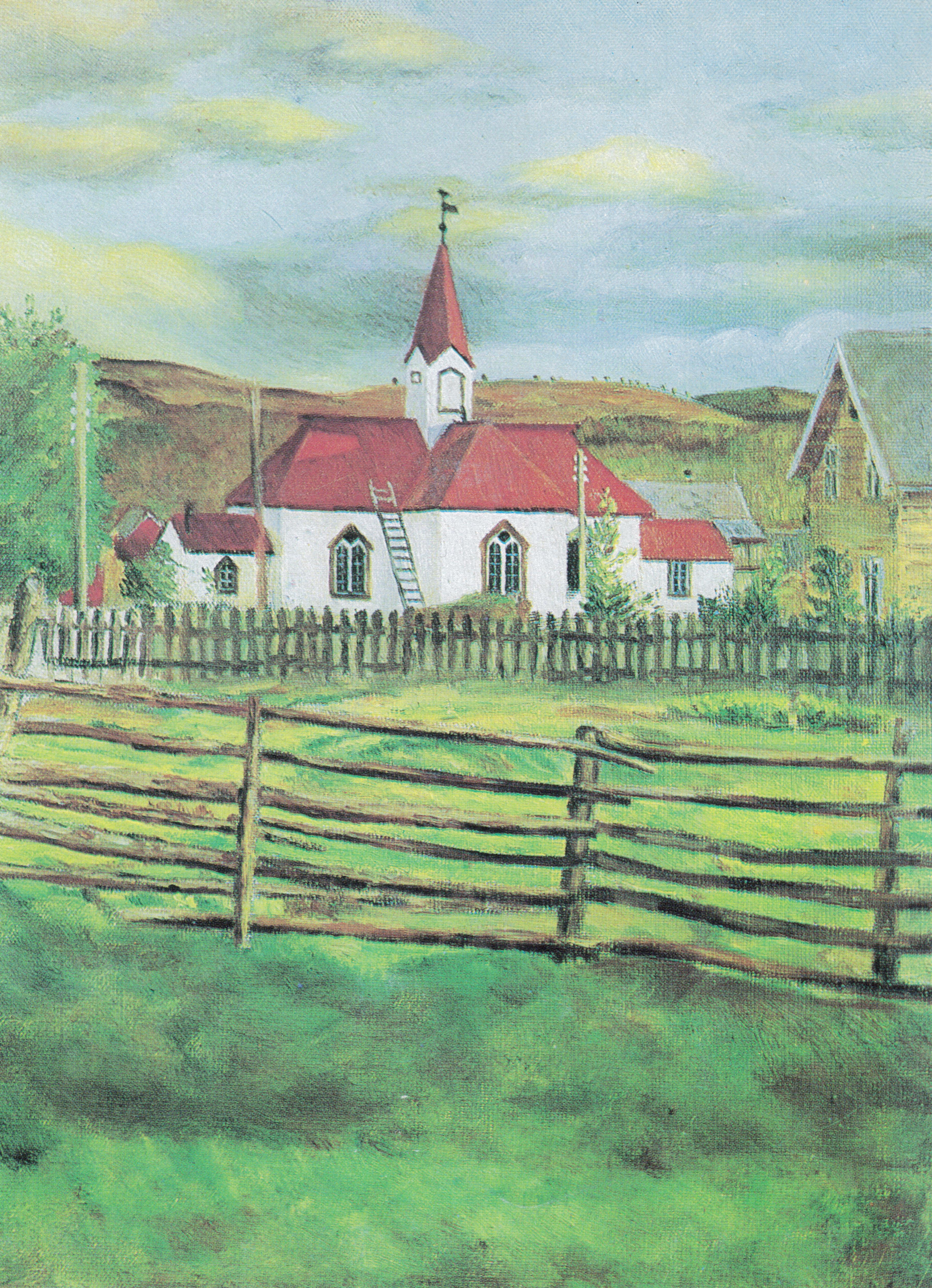 Norwegian: Karasjok kirke Karasjok church or Kárášjohka church